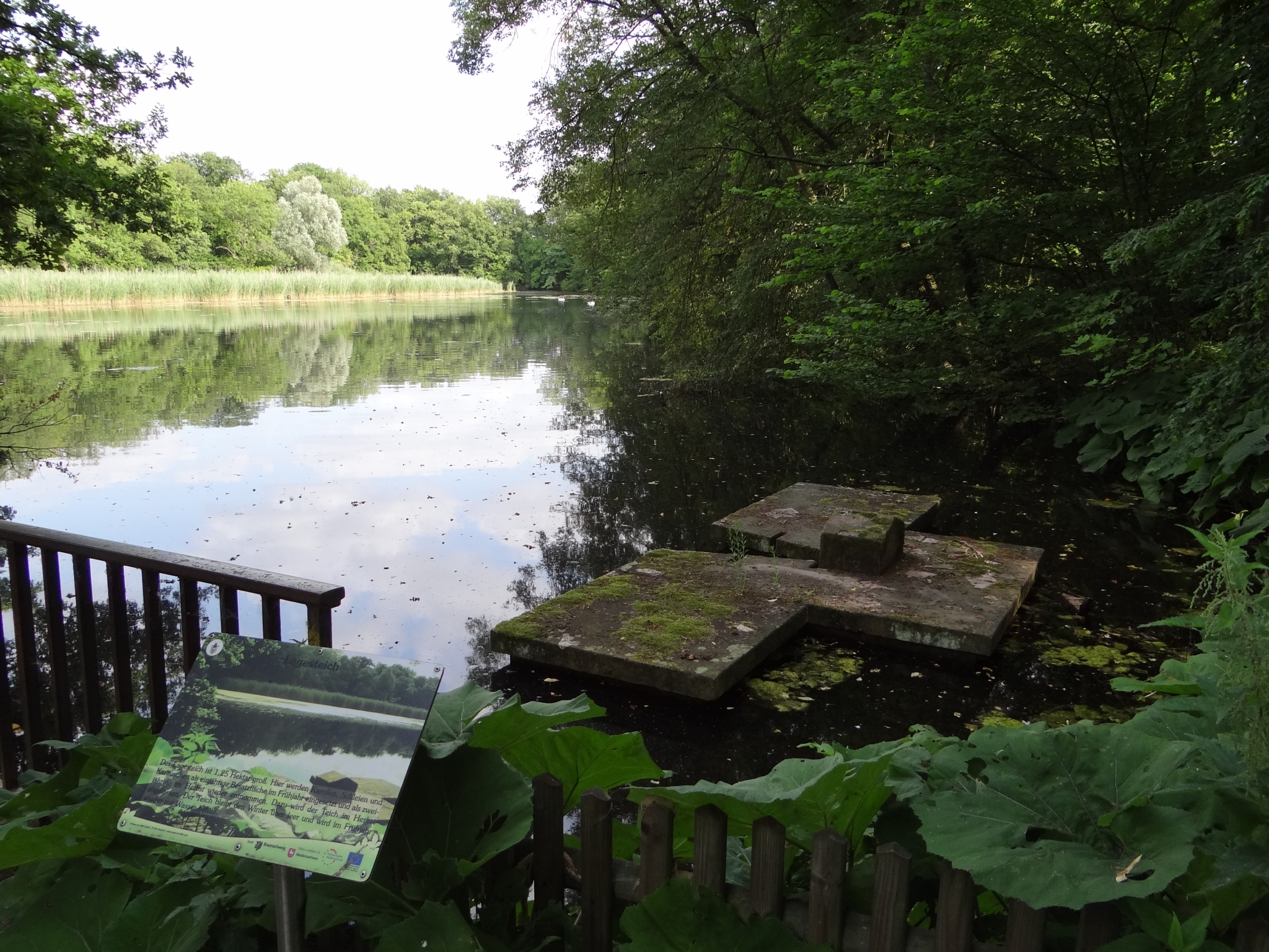 Lagesteich, Blick von der Nordseite nach Süden